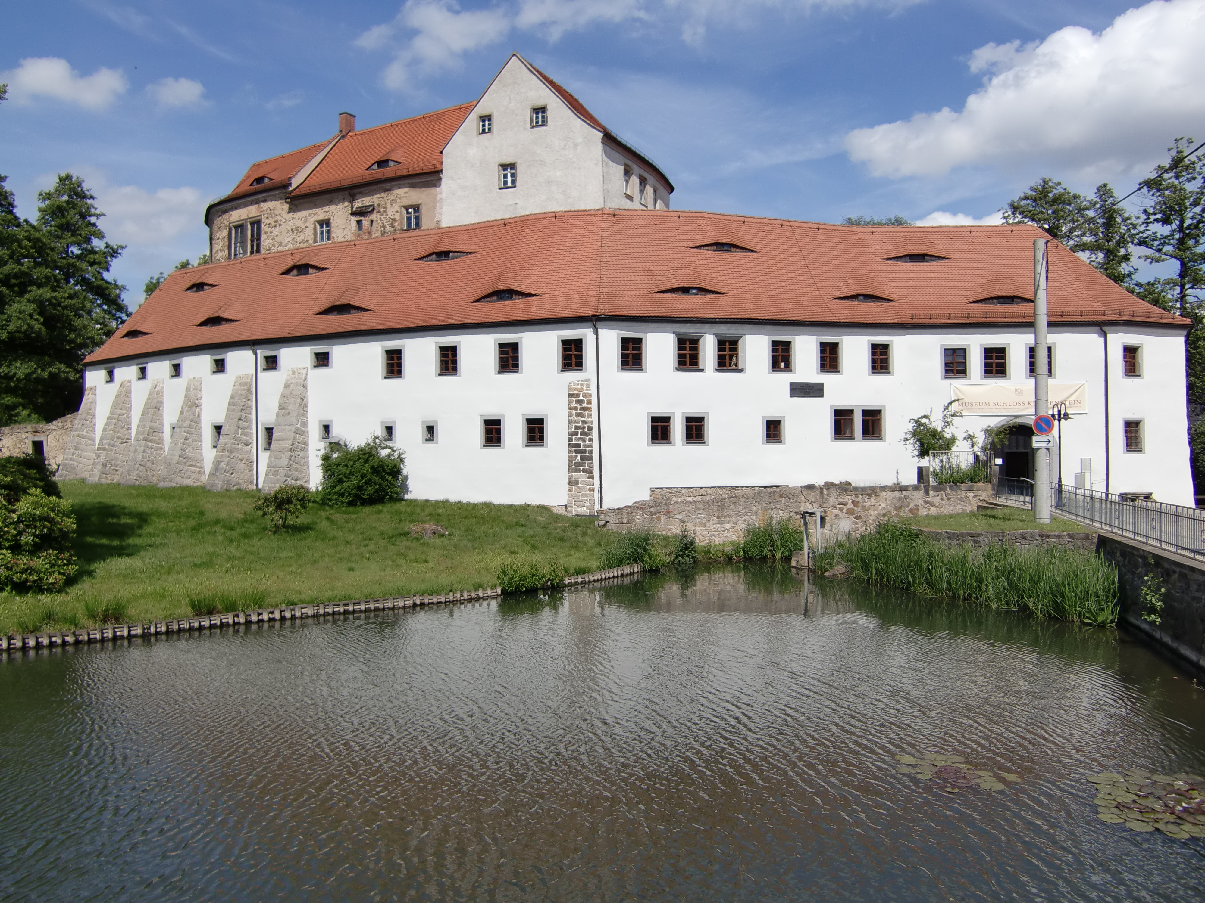 Castle Klippenstein (Radeberg)